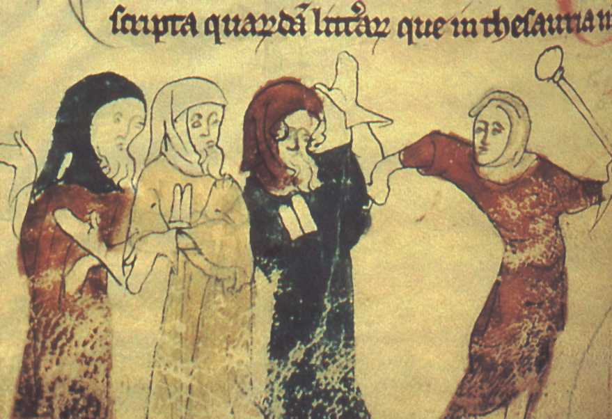 Miniature showing the expulsion of Jews following the Edict of Expulsion by Edward I of England (18 July 1290). Marginal Illustration from the Rochester Chronicle (British Library, Cotton Nero D. II.), folio 183v. fr. Sur l'illustration, les Juifs arborent la tabula en forme de Tables de la Loi imposée par Henry III d'Angleterre pour les discriminer, dès 1253. Henri III avait précédemment fait construire le Domus Conversorum à Londres en 1232 pour pousser à la conversion des Juifs au christianisme et ses efforts s'intensifièrent après 1239, quand il ruina la communauté juive par des amendes exorbitantes puis fit exécuter des Juifs pour meurtre rituel en 1255 à Lincoln ; près de 10 % des Juifs d'Angleterre s'étaient convertis à la fin des années 1250.